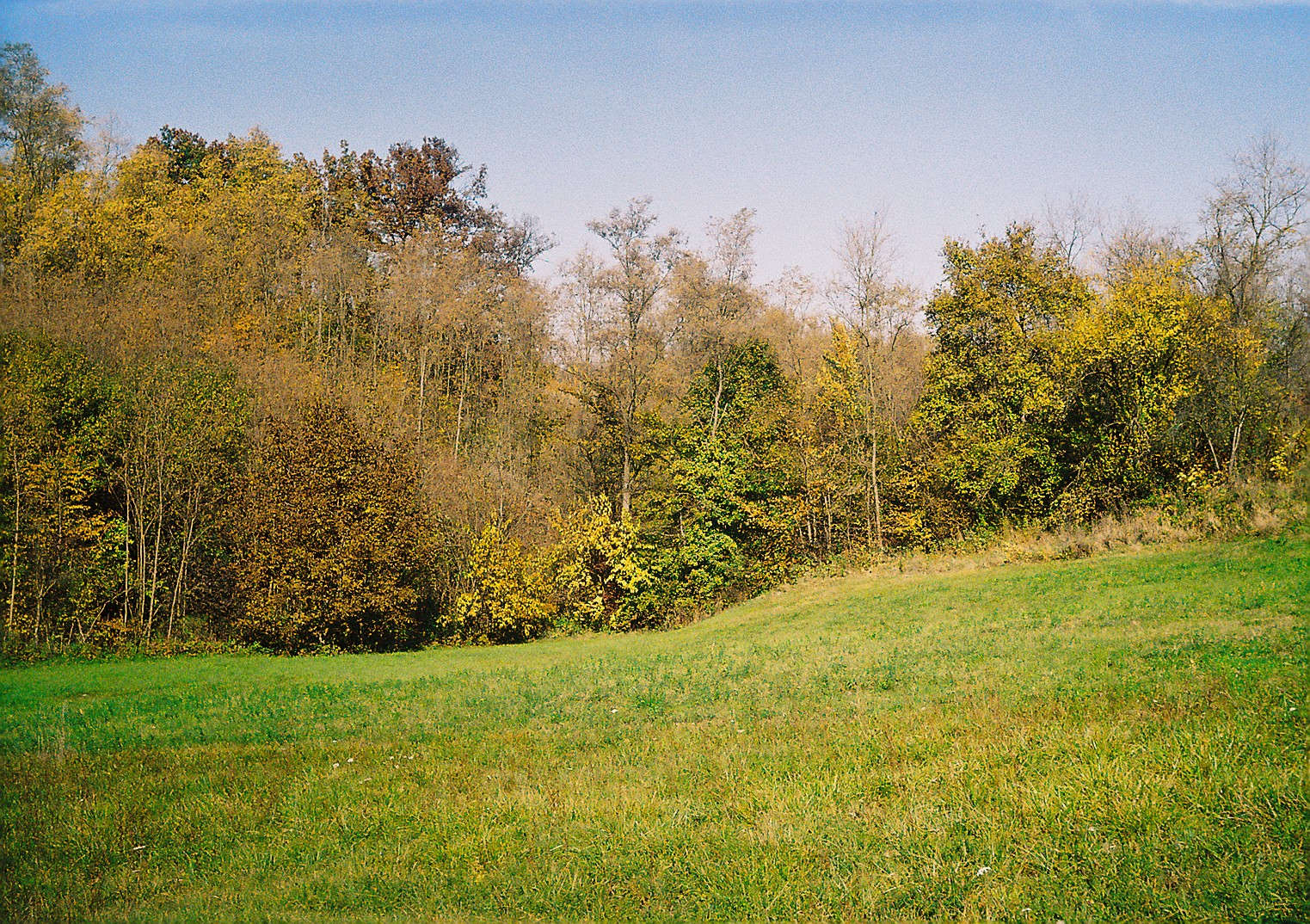 Countryside near Gornja Omašnica, Trstenik, Serbia/Paysagae près de Gornja Omašnica, Trstenik, Serbie